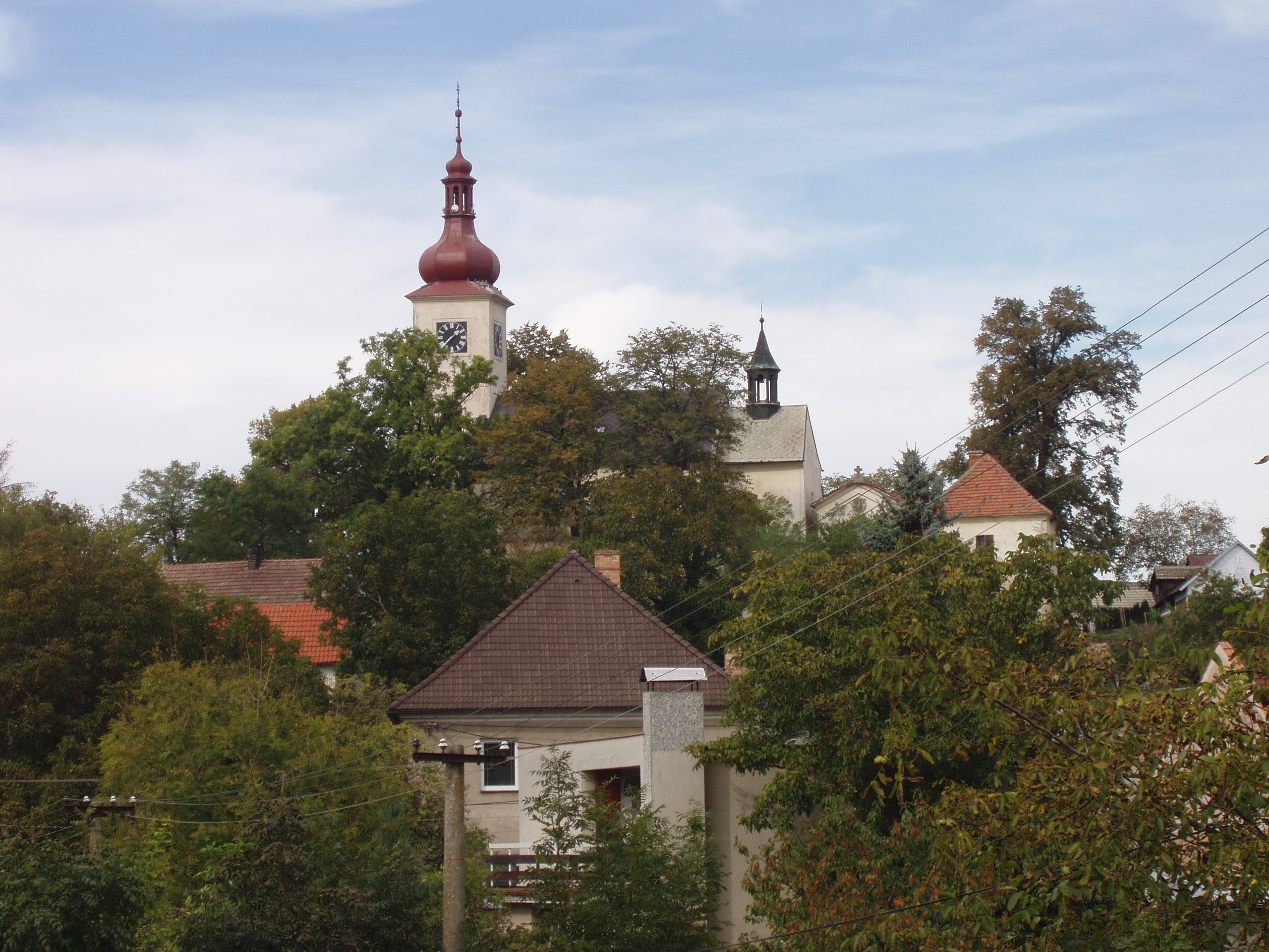 Kostel sv. Markéty (Křesetice), Křesetice